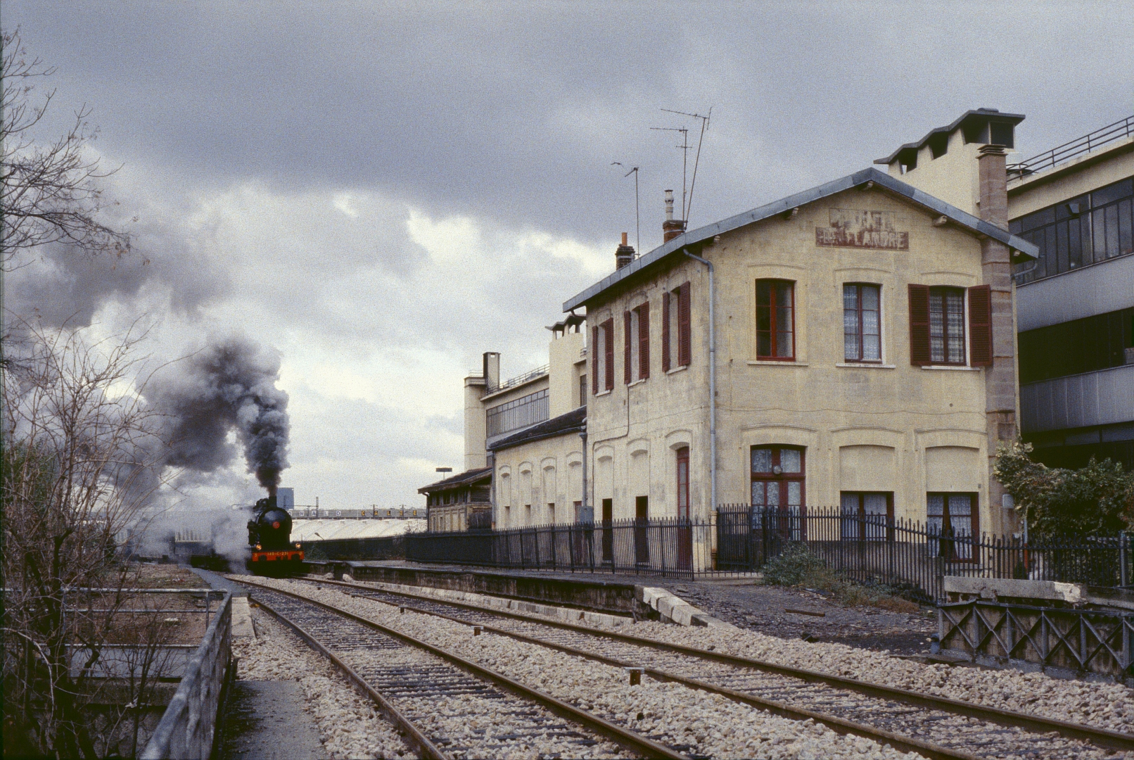 Passage d'un train en gare du pont de Flandre sur la Petite Ceinture de Paris dans le 19e arrondissement le 10 décembre 1983.